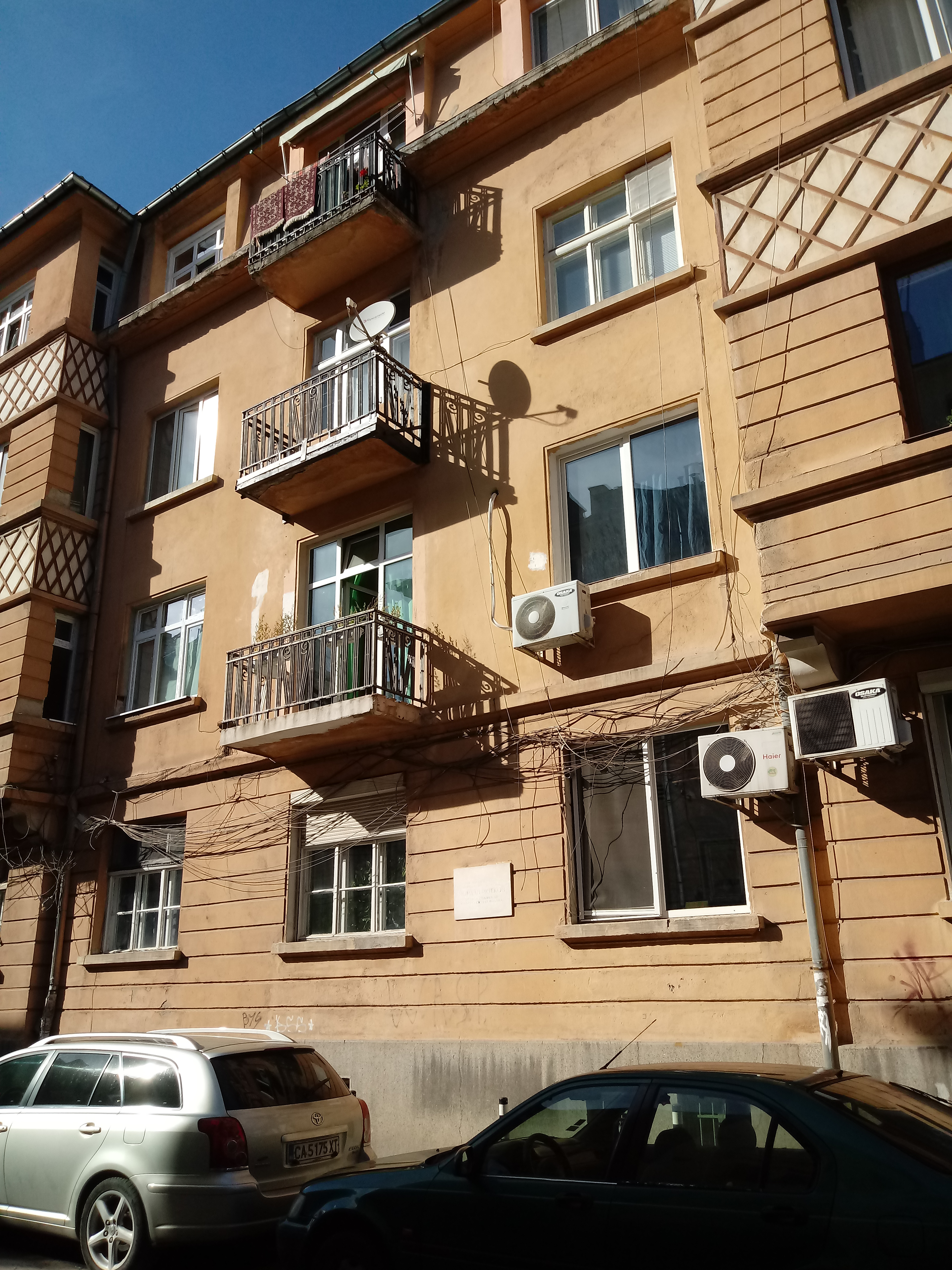 Домът с паметна плоча на писателя Йордан Йовков на ул. "Янтра" 13А, София, в която живее от 1933 до смъртта си през 1937 година